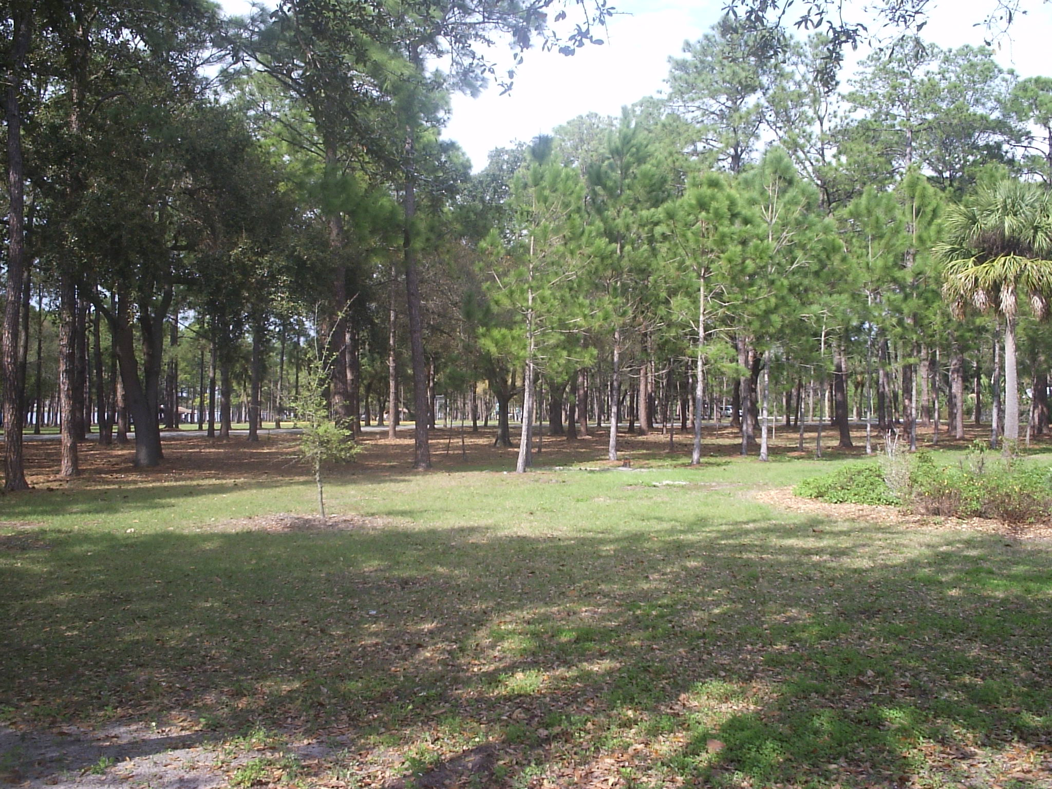 Taylor Lake, Largo, Florida. Pines (Pinus elliottii)